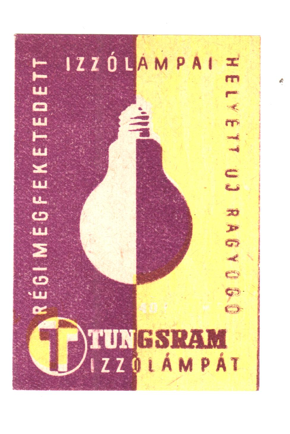 Az Egyesült Izzólámpa és Villamossági Rt. az 1940 -es évek végétől gyufacímkéken is népszerűsítette termékeit, a Tungsram ízzókat. A tulajdonomban álló gyufacímkét 2012. június 18 -án szkenneltem. Megjelent Creative Commons alatt a Metapolisz DVD sorozatban.